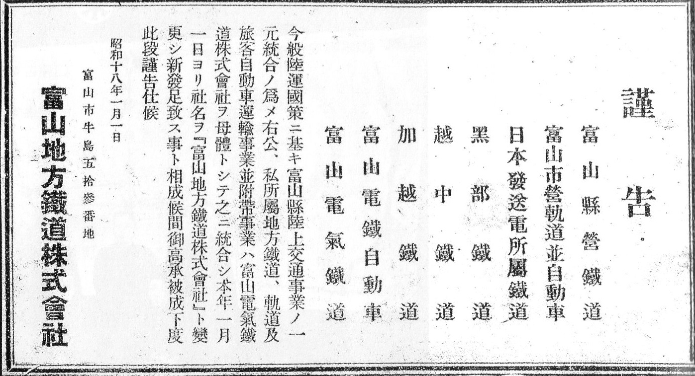 富山県陸上交通事業統合に伴う富山地方鉄道株式会社の広告